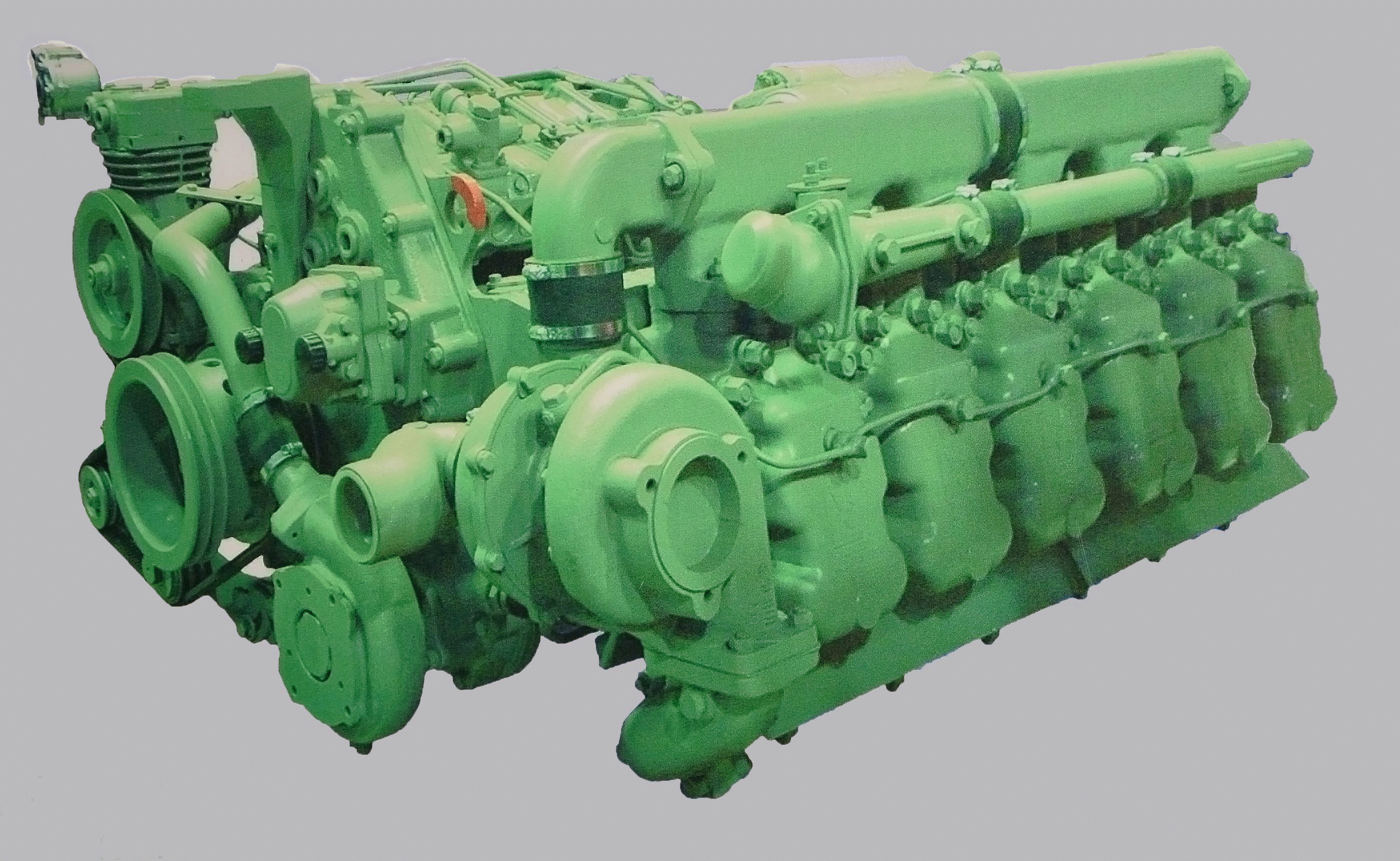 Горизонтальный 6-ти цилиндровый двигатель ОАО "АМЗ"